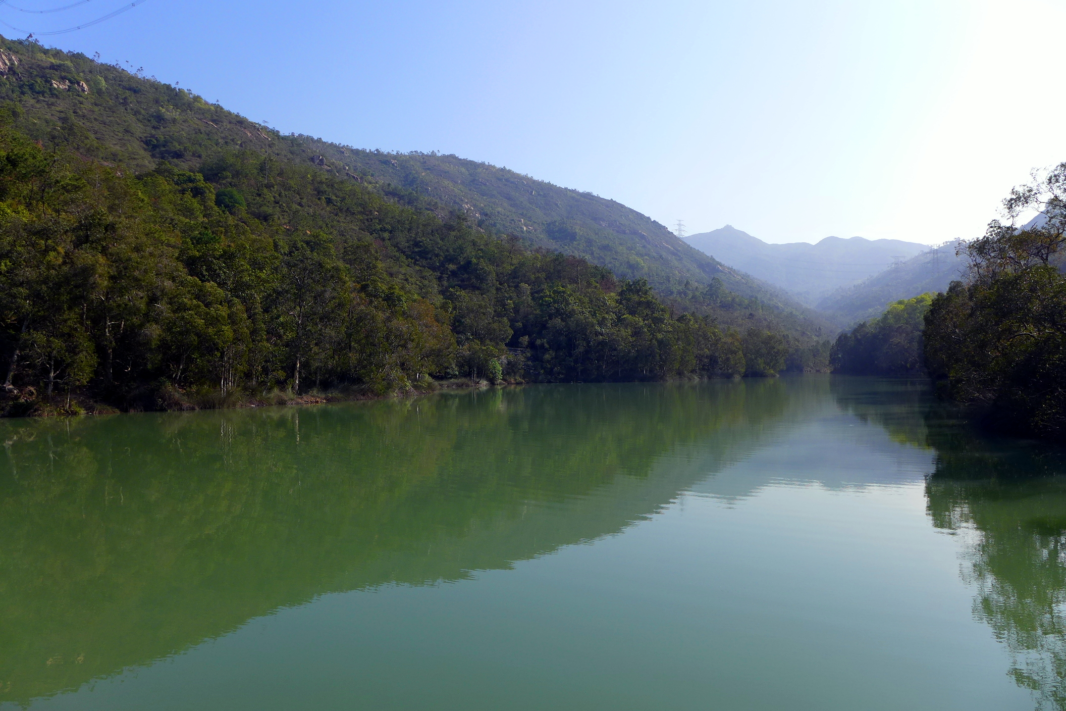 Lam Tei Reservoir